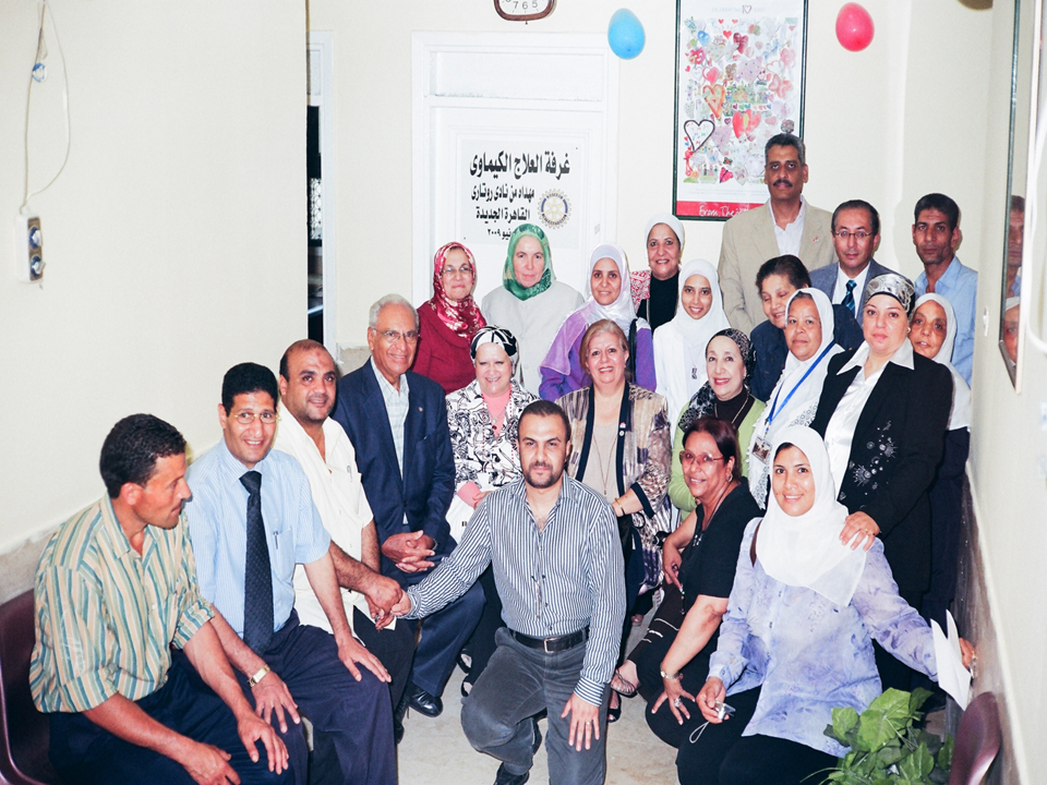 فريق علاج أمراض الدم و الأورام بمستشفى الأطفال -كلية الطب- جامعة عين شمس وحدة أ.د/ جلبلة مختار أستاذ طب الأطفال والدم و الأورام و رئيس قسم طب الأطفال 2012